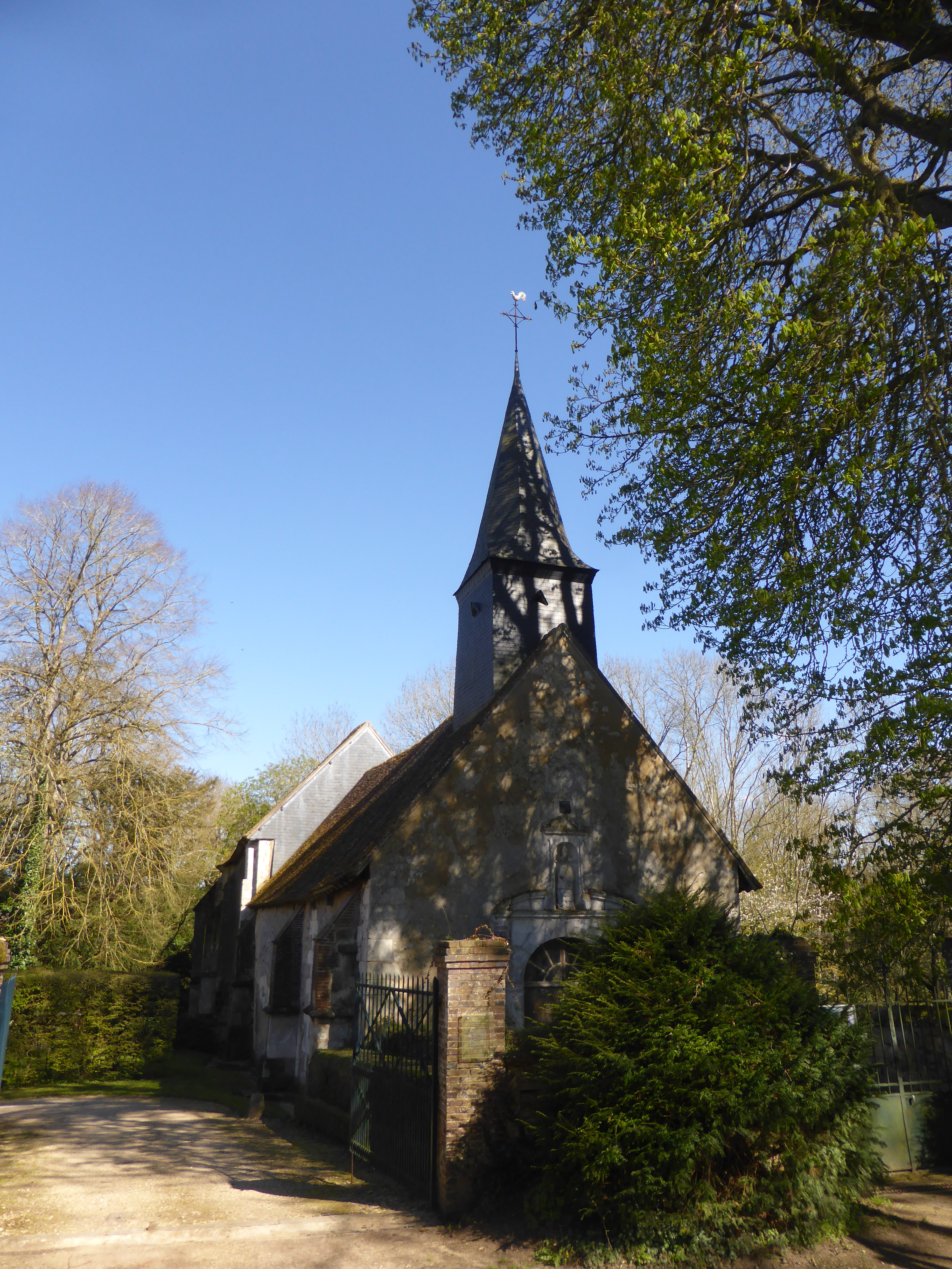 Église Saint-Nicolas de Maison-Maugis, dans l'Orne.